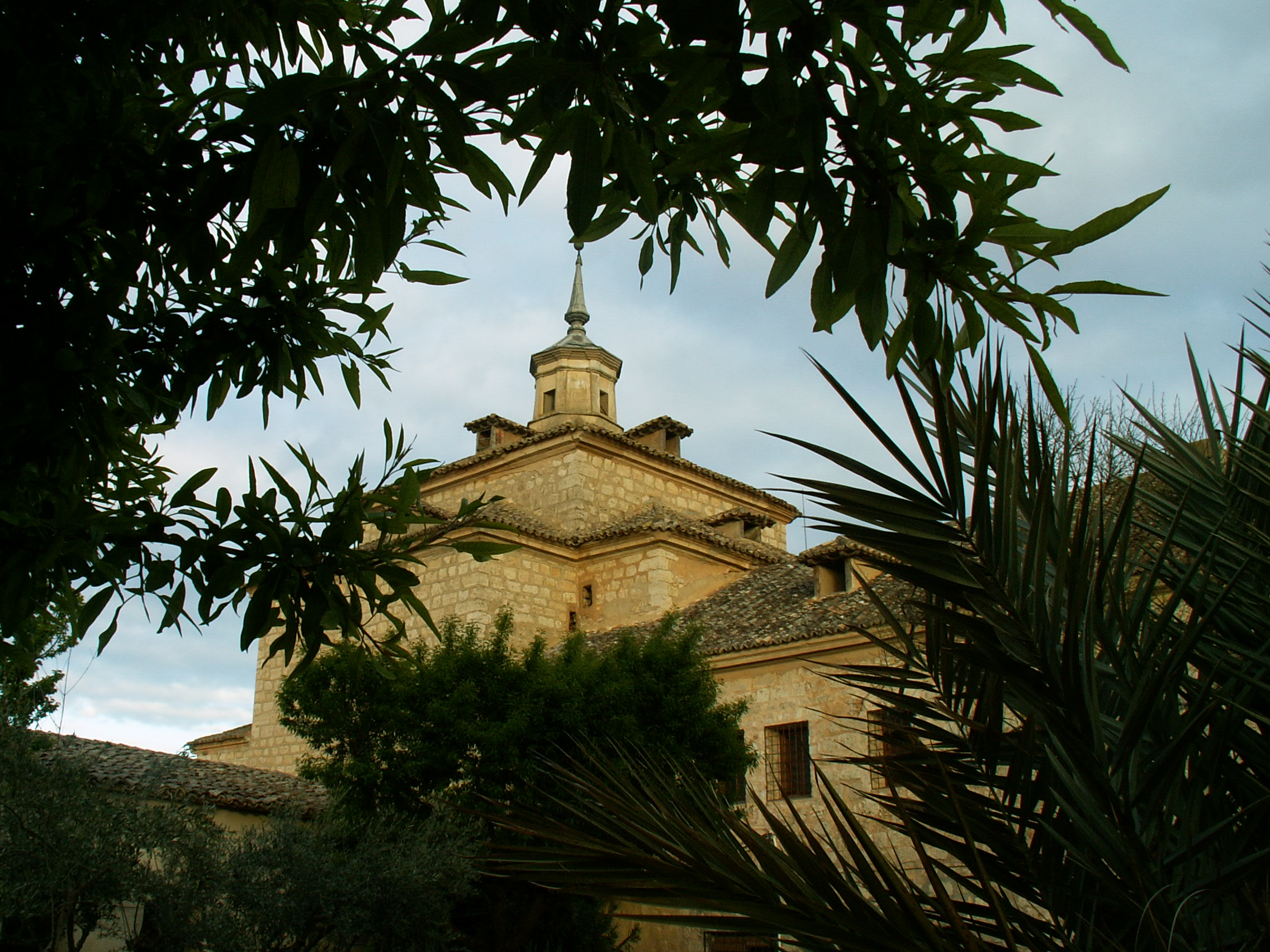 Torre del Monasterio de Monjas Trinitarias de El Toboso, Toledo.